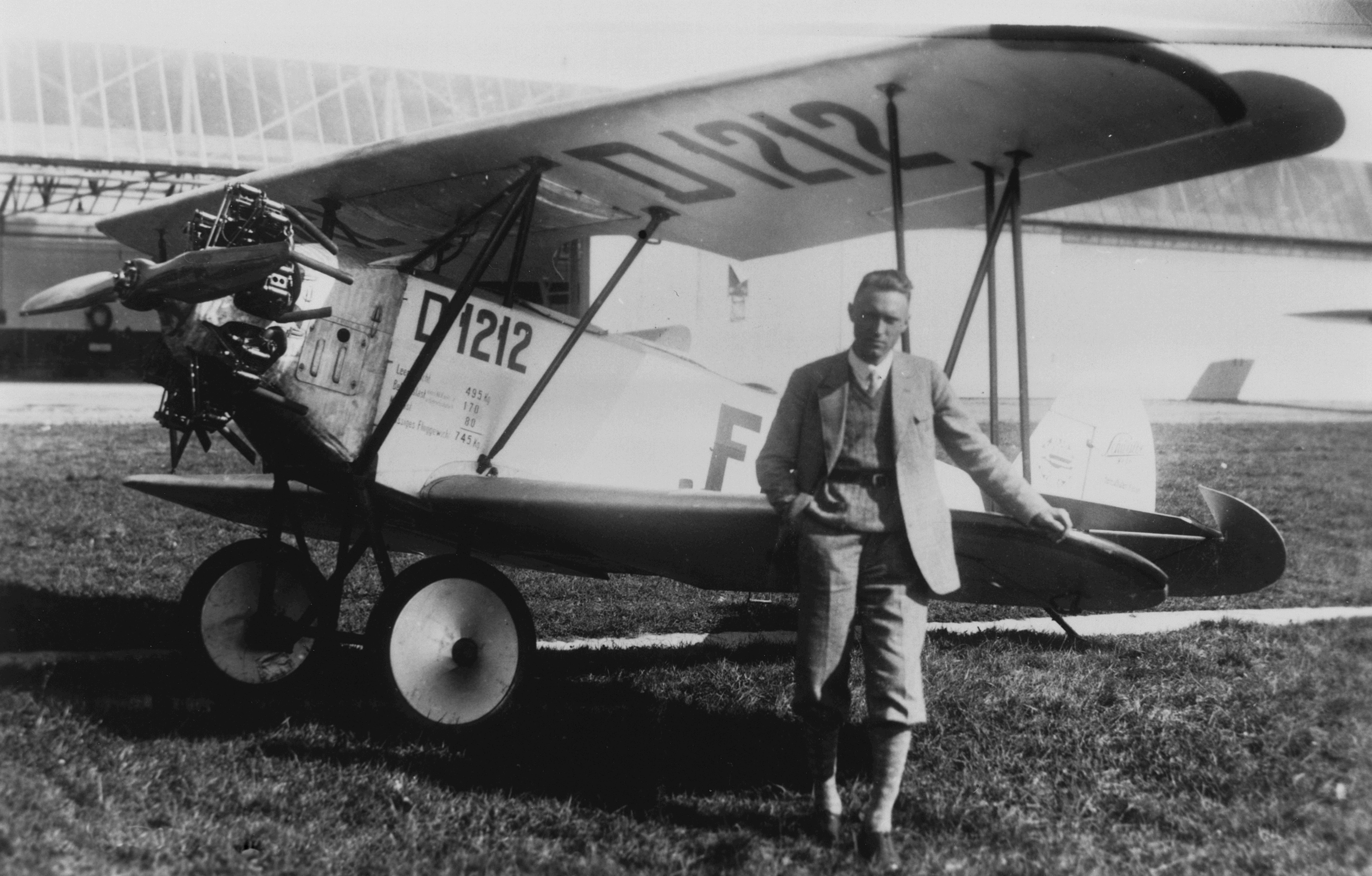 Pilot und Flugzeug-Konstrukteur Gerhard Fieseler vor Raab-Katzenstein Kl. 1 Schwalbe mit deutscher Kennung "D 1212"